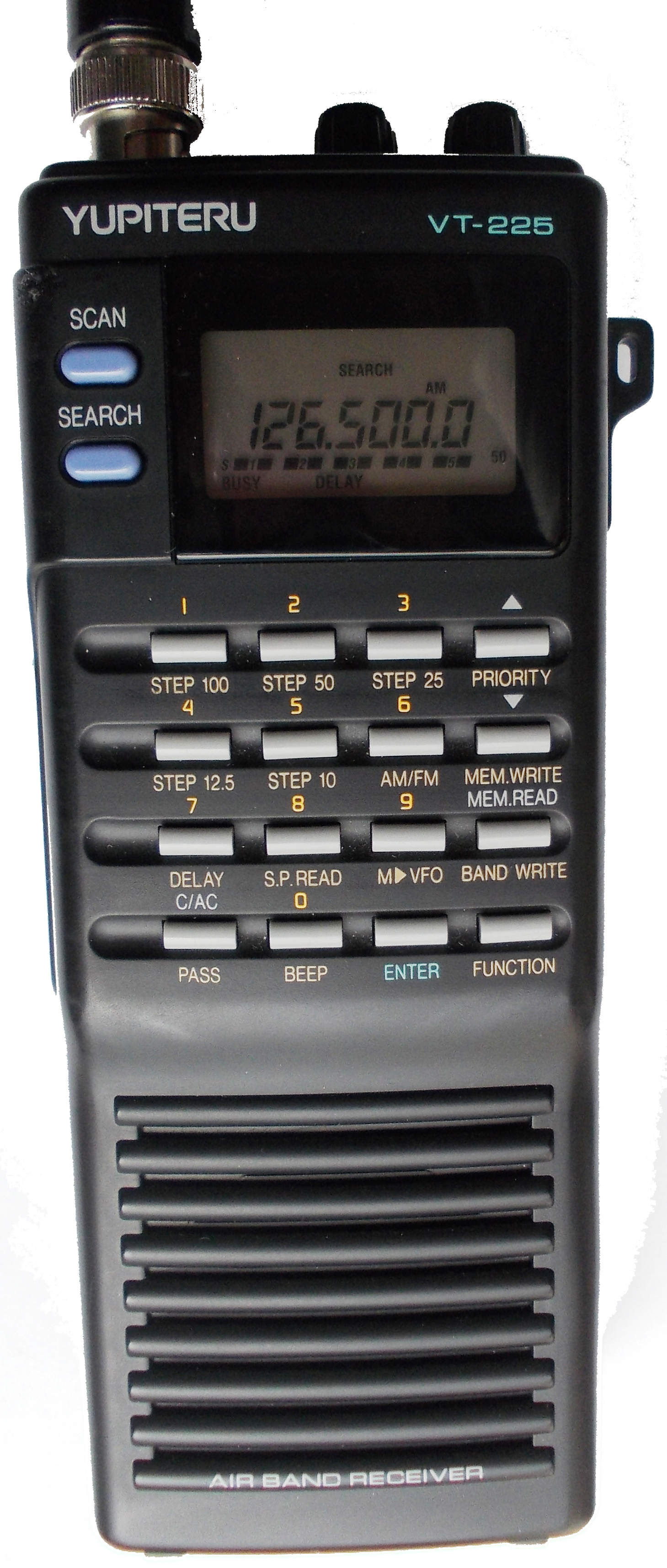 Récepteur bande aéronautique type VT225 YUPITERU en écoute de L'ATIS de Paris Orly sur 126,5MHz information et météo (ATIS de l'anglais Automatic Terminal Information Service)